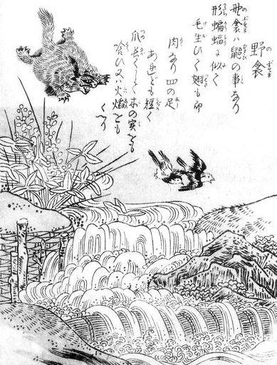 Nobusuma (野衾, a monstrous flying squirrel) from the Konjaku Gazu Zoku Hyakki (今昔画図続百鬼)